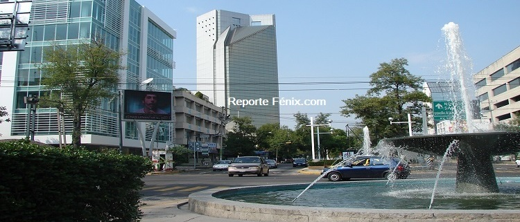 Clima Gdl 11 mar 2013 - Avenida Chapultepec cruce Avenida Vallarta (Torre Chapultepec al fondo)